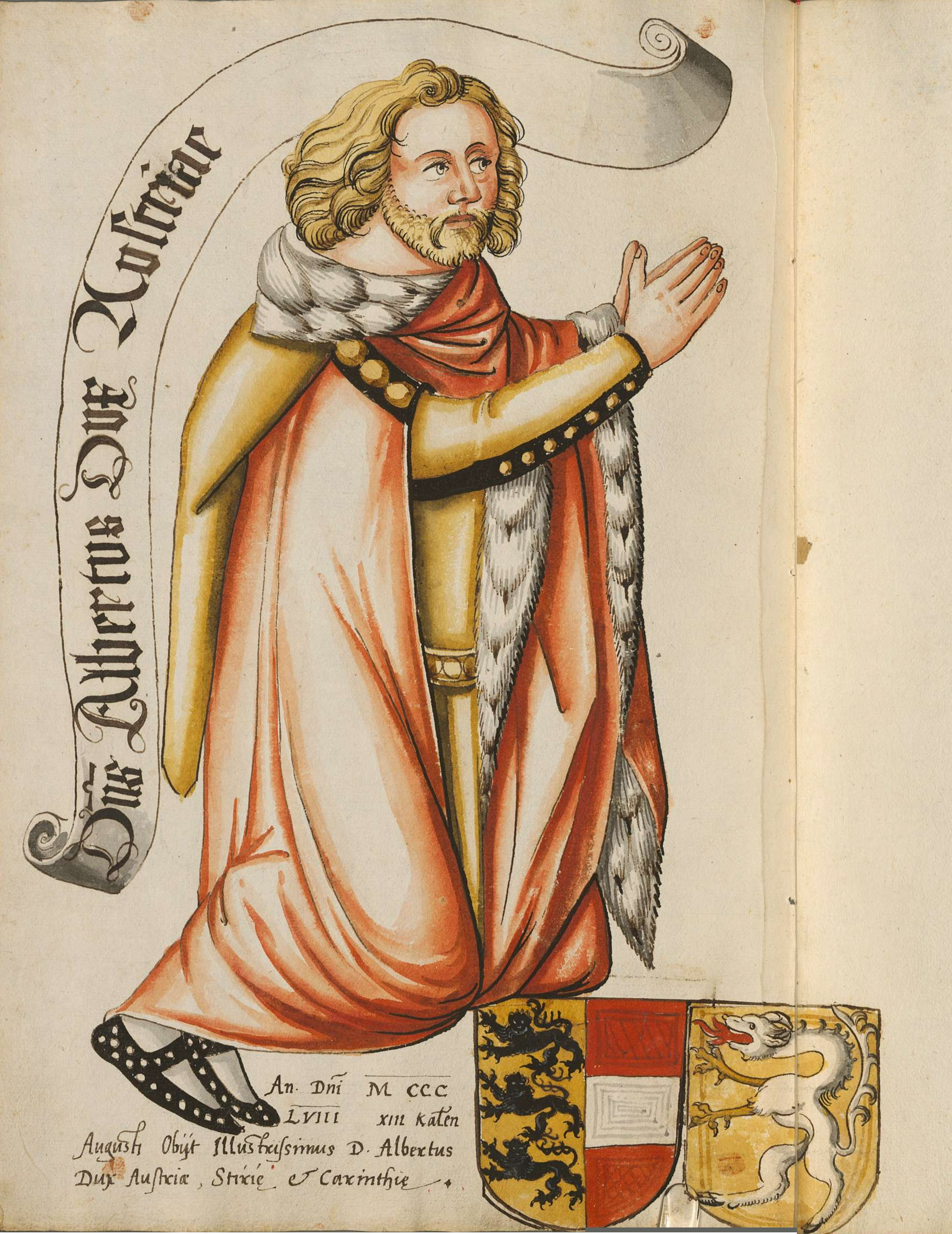 Fürstenbildnisse der Habsburger des 14. Jh. nach den Glasfenstern von Königsfelden/Aargau - BSB Cod.icon. 330 [S.l.] Nordschweiz (Bern ?) um 1560 fol. 19v: Albrecht II. der Weise, Herzog von Österreich; Rest des Wappens unten rechts von fol. 24r hinzugefügt